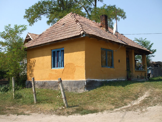 Aruncuta - primul sediu al CAP-ului , martie 1961